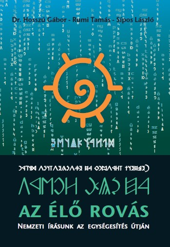 Élő Rovás - Nemzeti írásunk az egységesítés útján. Imagent Kft. – Wou kft., Budapest, 2010. 2. kiadás ISBN 9789638796752 A székely-magyar rovást értők, kedvelők évről-évre gyarapodó tábora mára százezres nagyságrendűvé vált, amely szükségszerűvé tette a nemzeti írás korszerű alkalmazási feltételeinek megteremtését. Ennek a folyamatnak részei a formai egységesítés, az írásszabályok korszerűsítése, valamint a műszaki szabványosítás, melyet a rovásírók közösségi alkotás keretében valósítanak meg - ahogyan tették azt őseik is az írás megőrzése és fejlesztése során. E könyv ennek a hagyományőrző alkotómunkának az egyik állomását mutatja be: a székely-magyar rovásírók közössége összegyűlt Gödöllőn 2008. október 4-én az "Élő Rovás" tanácskozásra, hogy a számítástechnika világába is bevezesse a magyarul beszélők nemzeti írását.